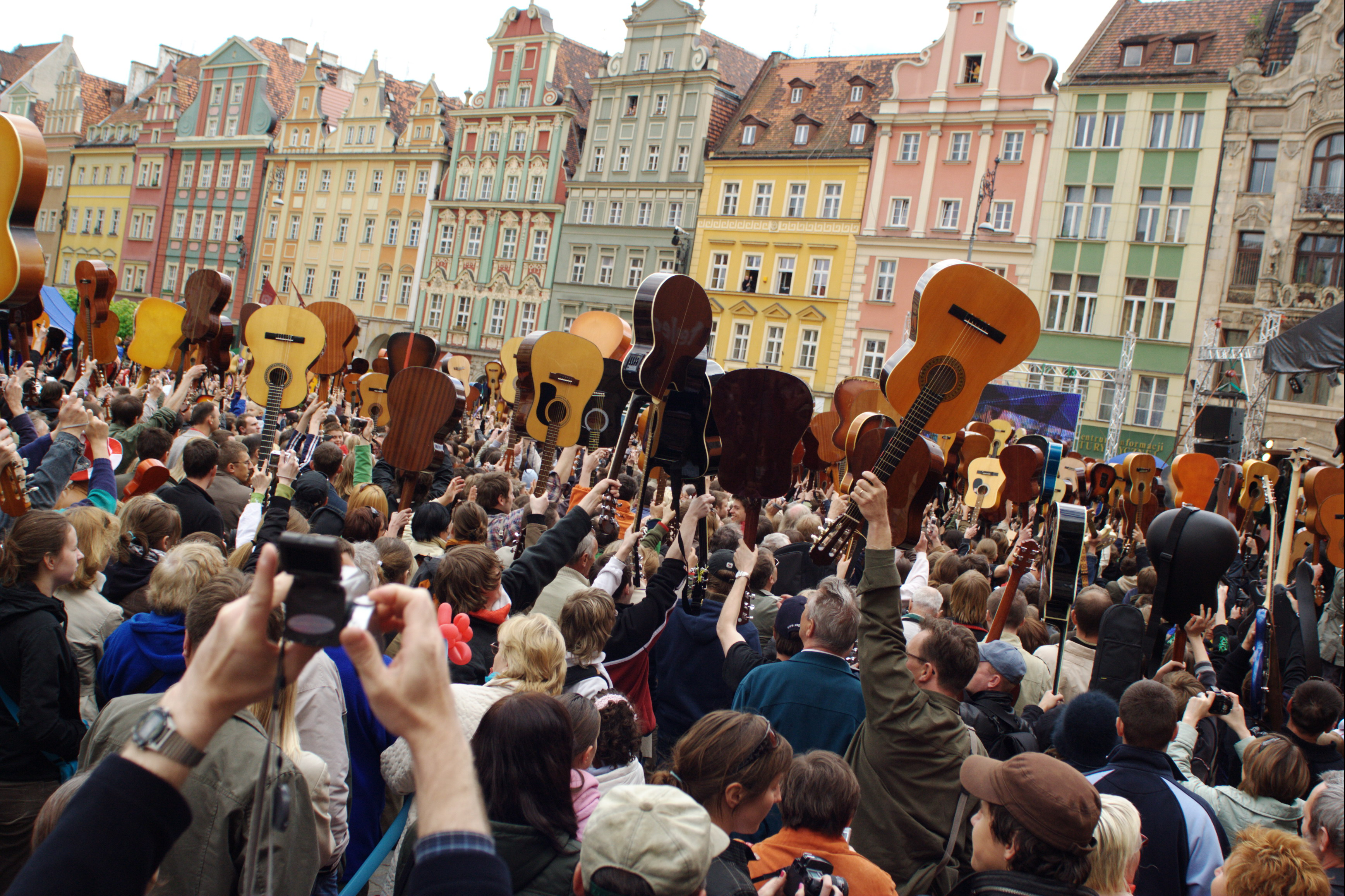 Bicie rekordu Guinnessa 1.05.2007 r. 1876 osób zagrało piosenkę Hey Joe.